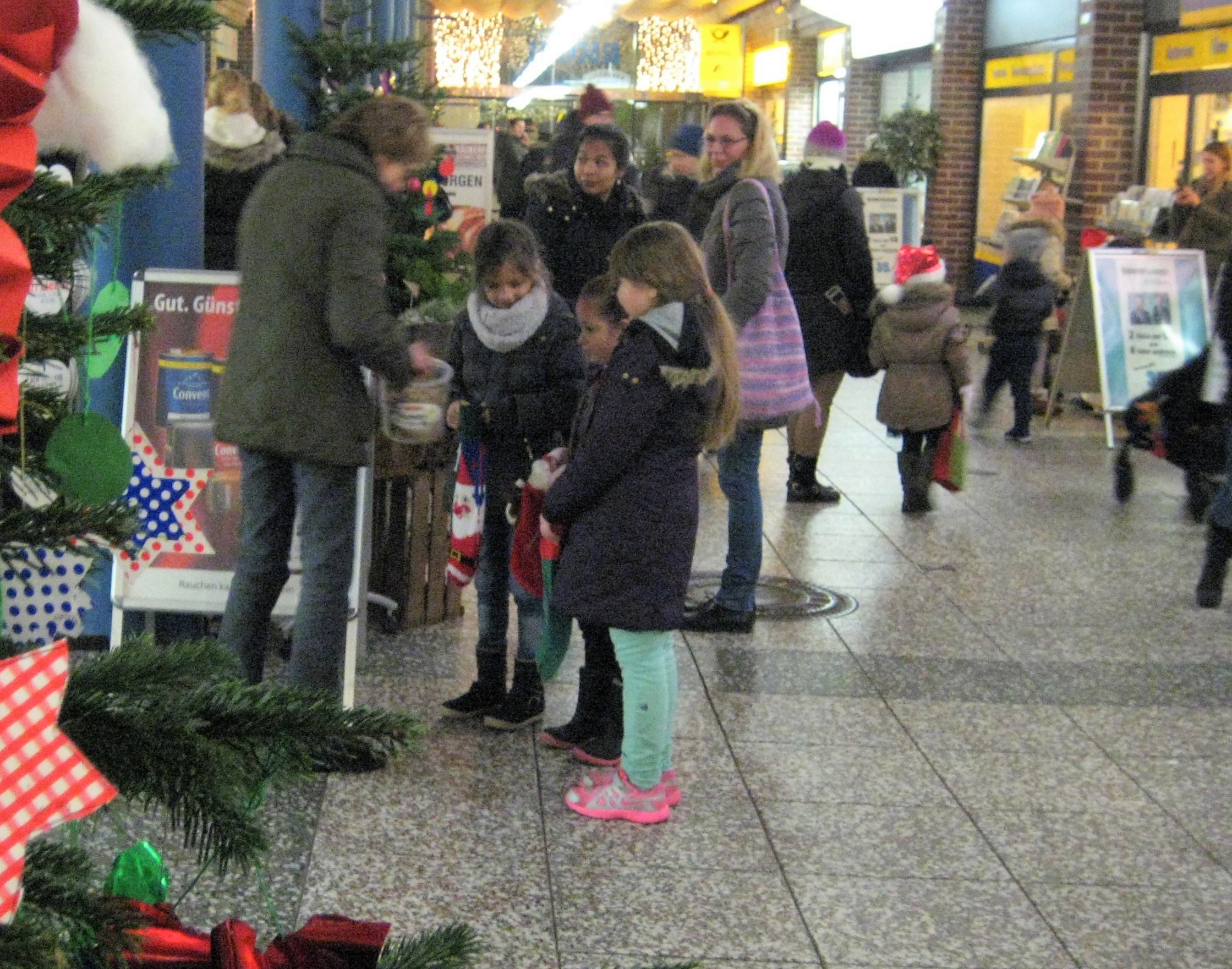 Kinder beim Nikolauslaufen (früher Sunnerklauslaufen) in Bremen